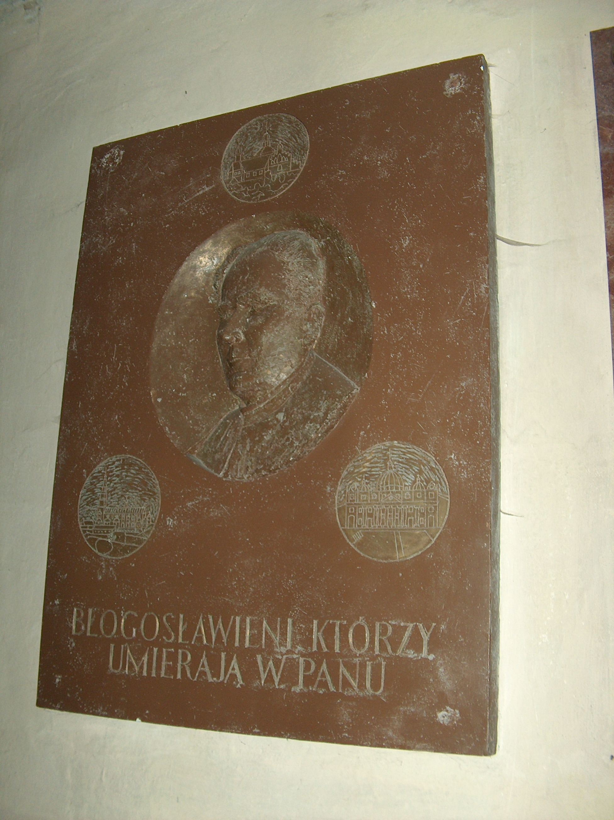 Jedna z dwóch tablic poświęconych ks. Wojciechowi Turowskiemu mieszczących się w kościele w Sząbruku.